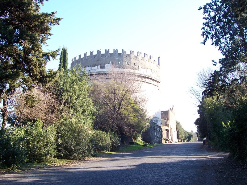 Roma - Tomba di Cecilia Metella